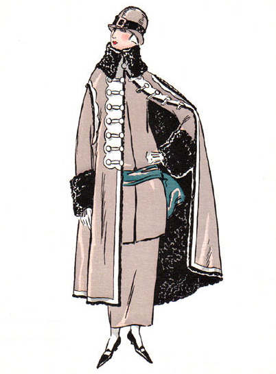 Fashion plate for La Gazette du Bon Ton, L'Astrakan "Manteau de peau de mouton, doublé de Astrakan"